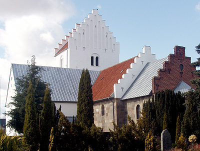 Odder Kirke, Odder, Hads Herred , Århus Amt , Denmark.